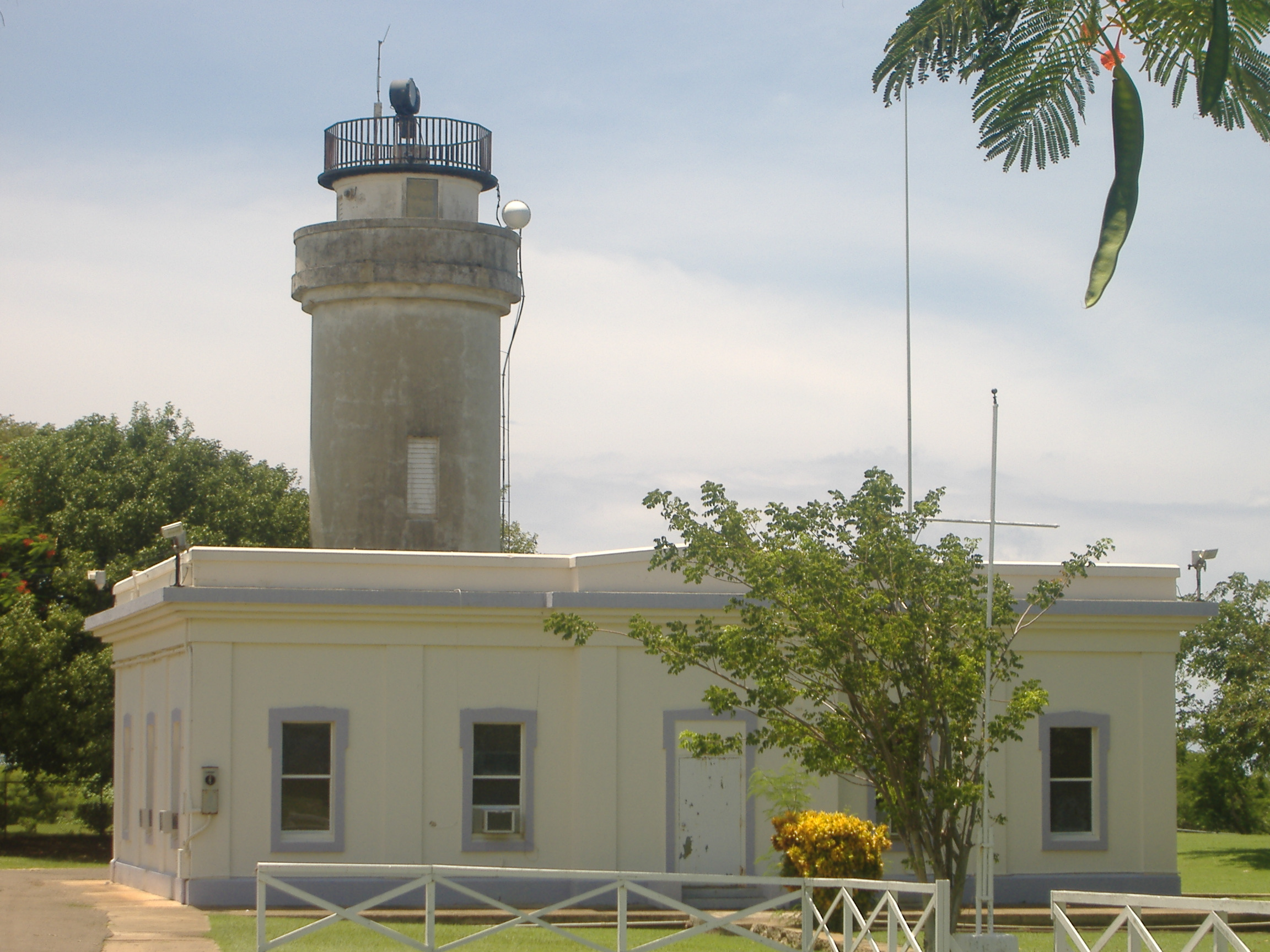 Punta Borinquen Lighthouse in Aguadilla, Puerto Rico.